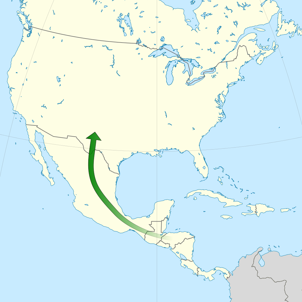 Mapa general del camino de la caravana migrante de Hondureños a Estados Unidos. Azul el camino recorrido. Rojo el punto de la avanzada. Amarillo el destino.